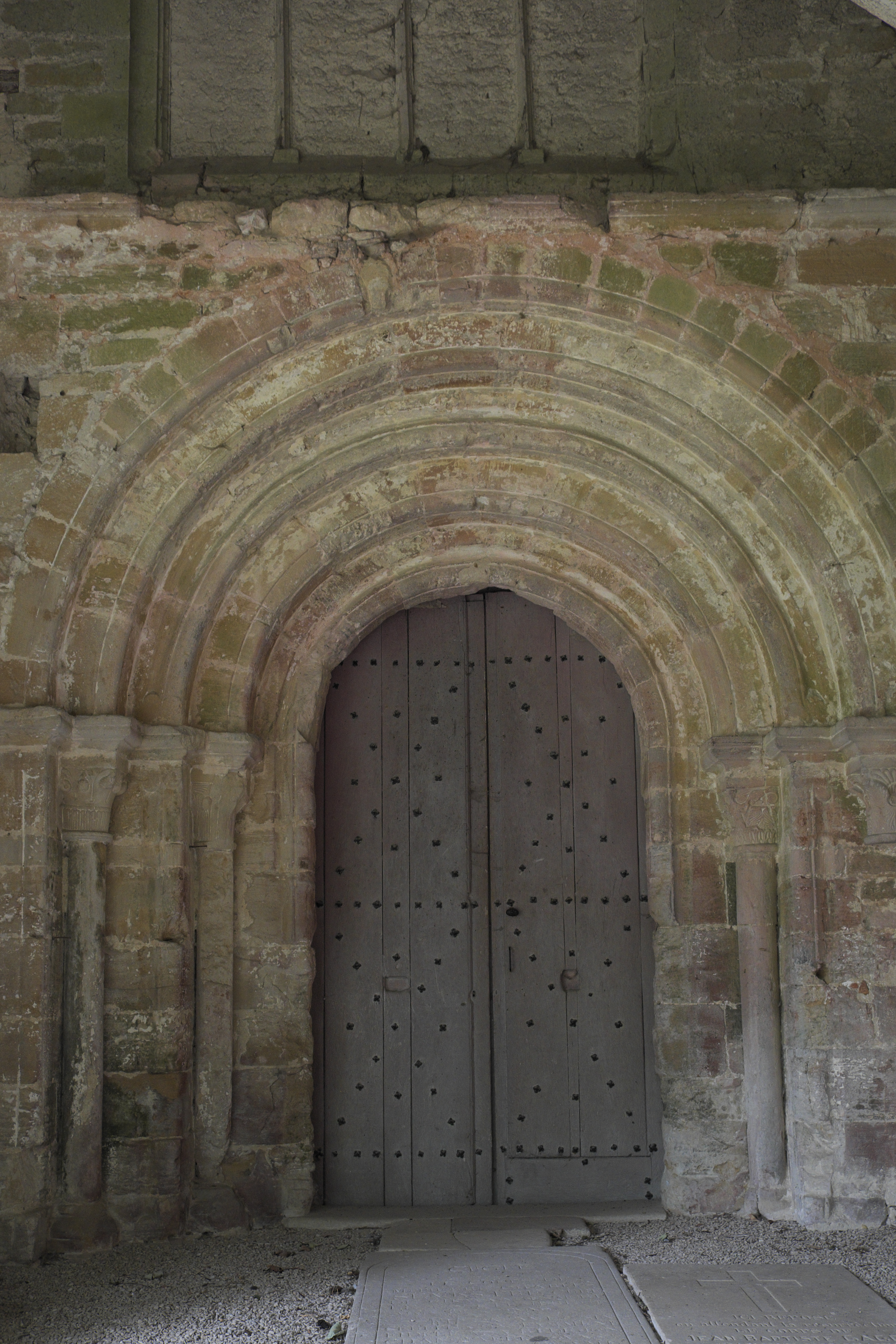 Katholische Kirche Saint-Georges in Chavanges im Département Aube (Champagne-Ardenne/Frankreich), romanisches Portal